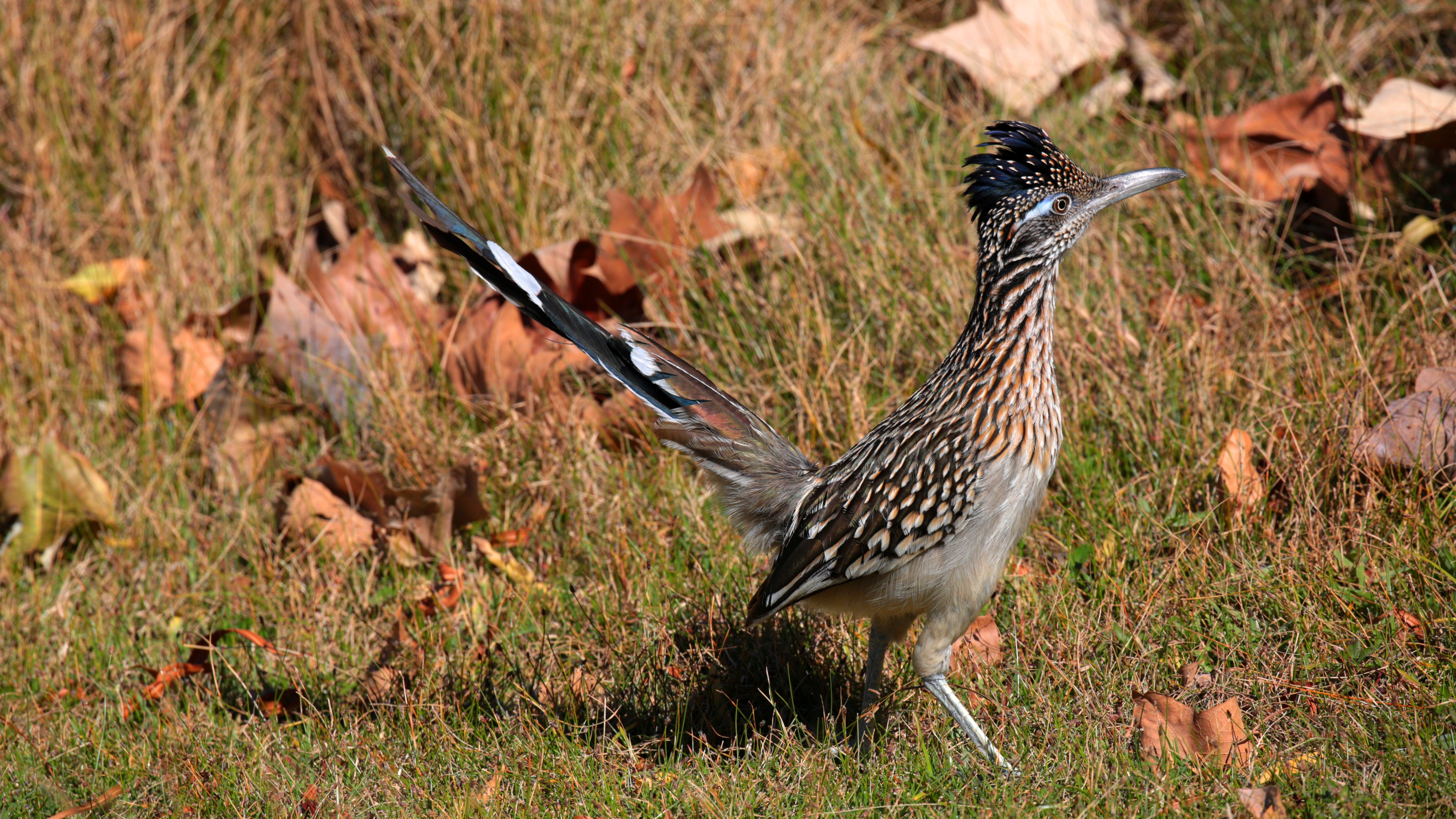 Correcaminos Norteño